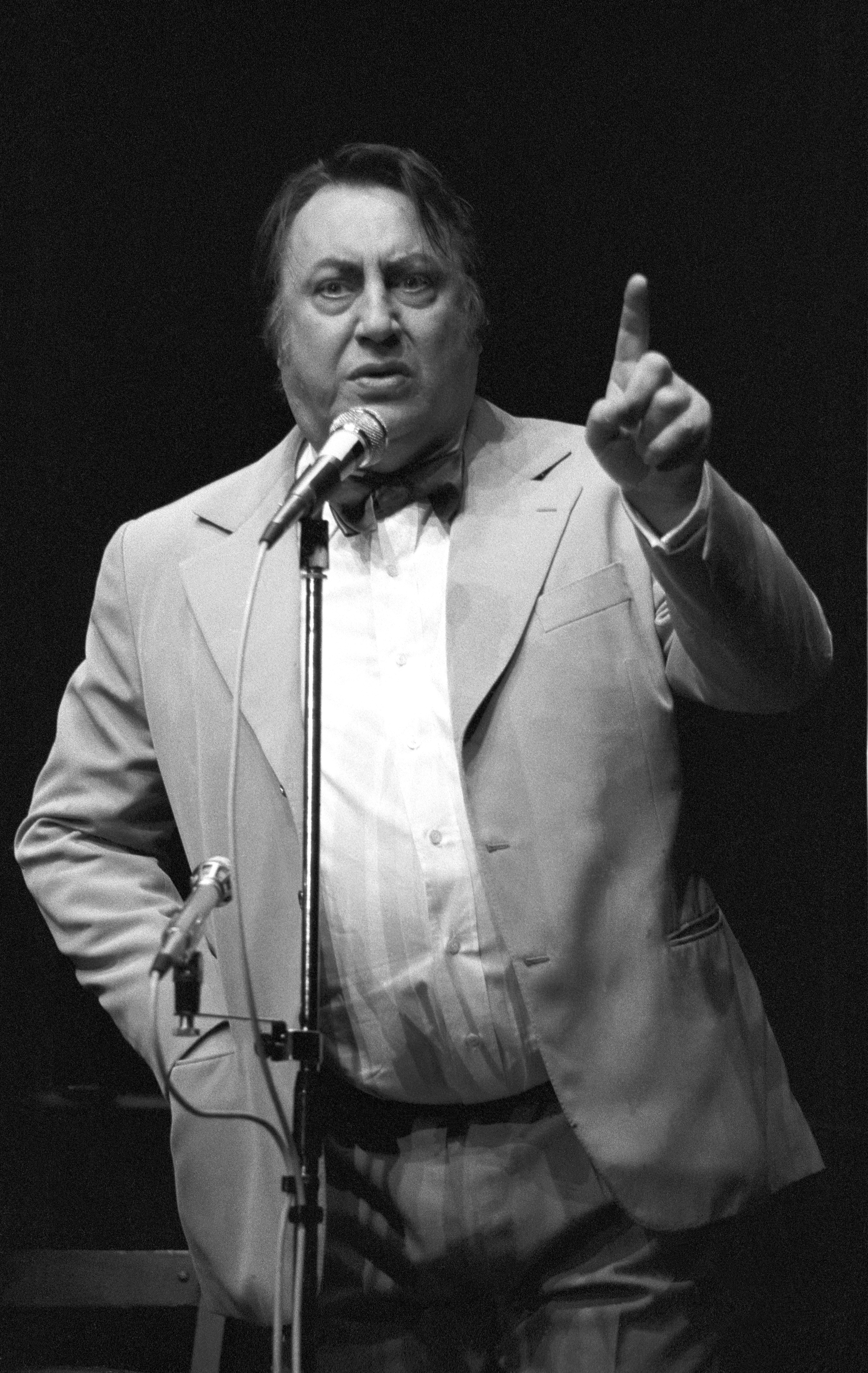 Raymond Devos à Strasbourg le 11 mai 1980